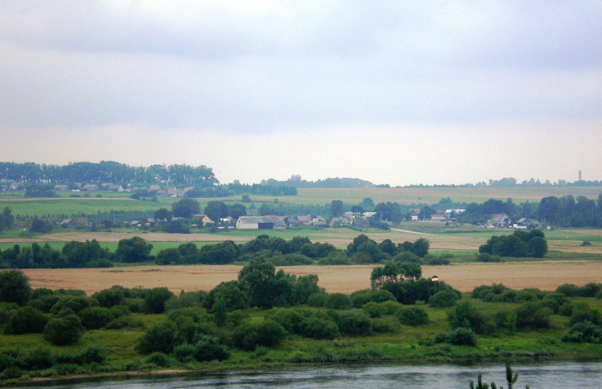 Mikytai, Šakiai dst.